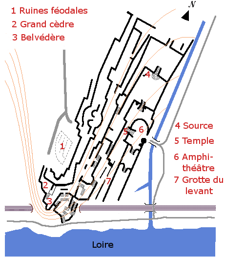 Plan d'implantation des Folies Siffait